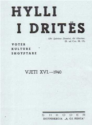 Issue of Hylli i Dritës, 1940